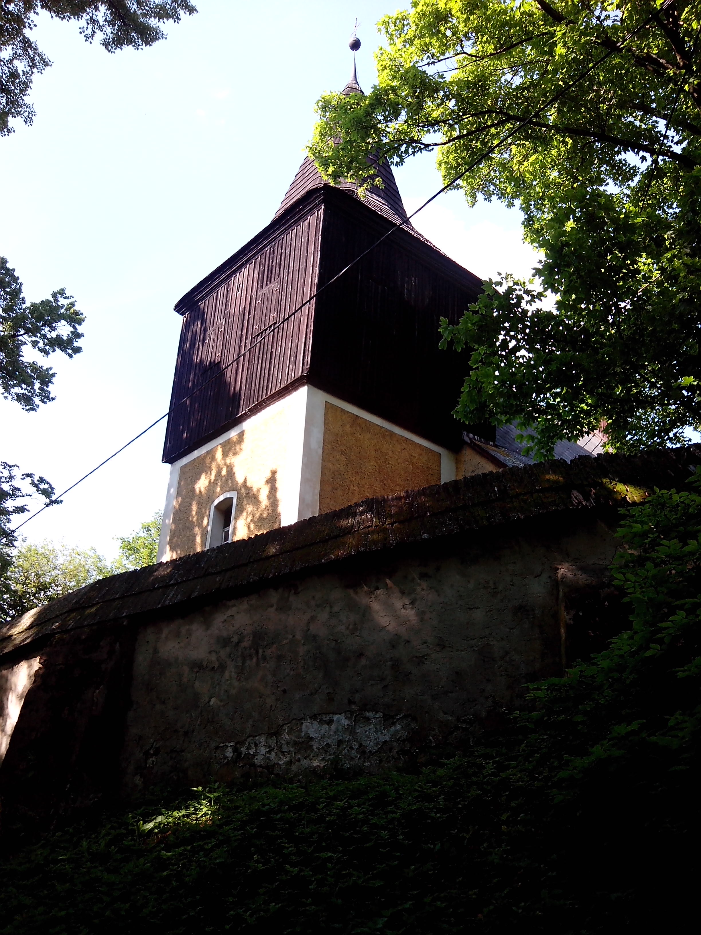 Dolní Žďár - kostel sv. Jana Křtitele